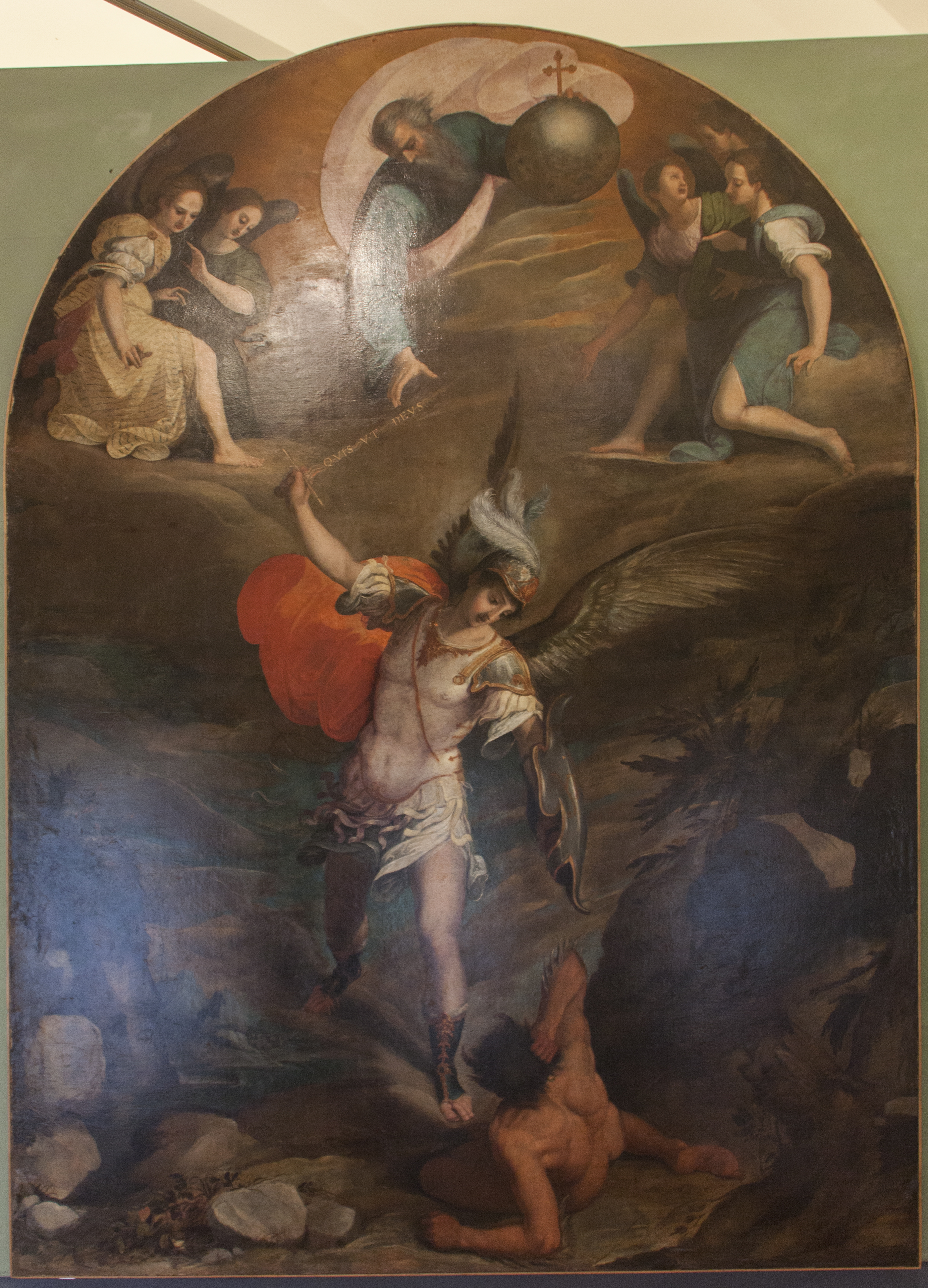 San Michele Arcangelo - Filippo Paladini (1601) Olio su tela, 390x262 cm Provenienza: Palermo, convento di san Francesco di Paola